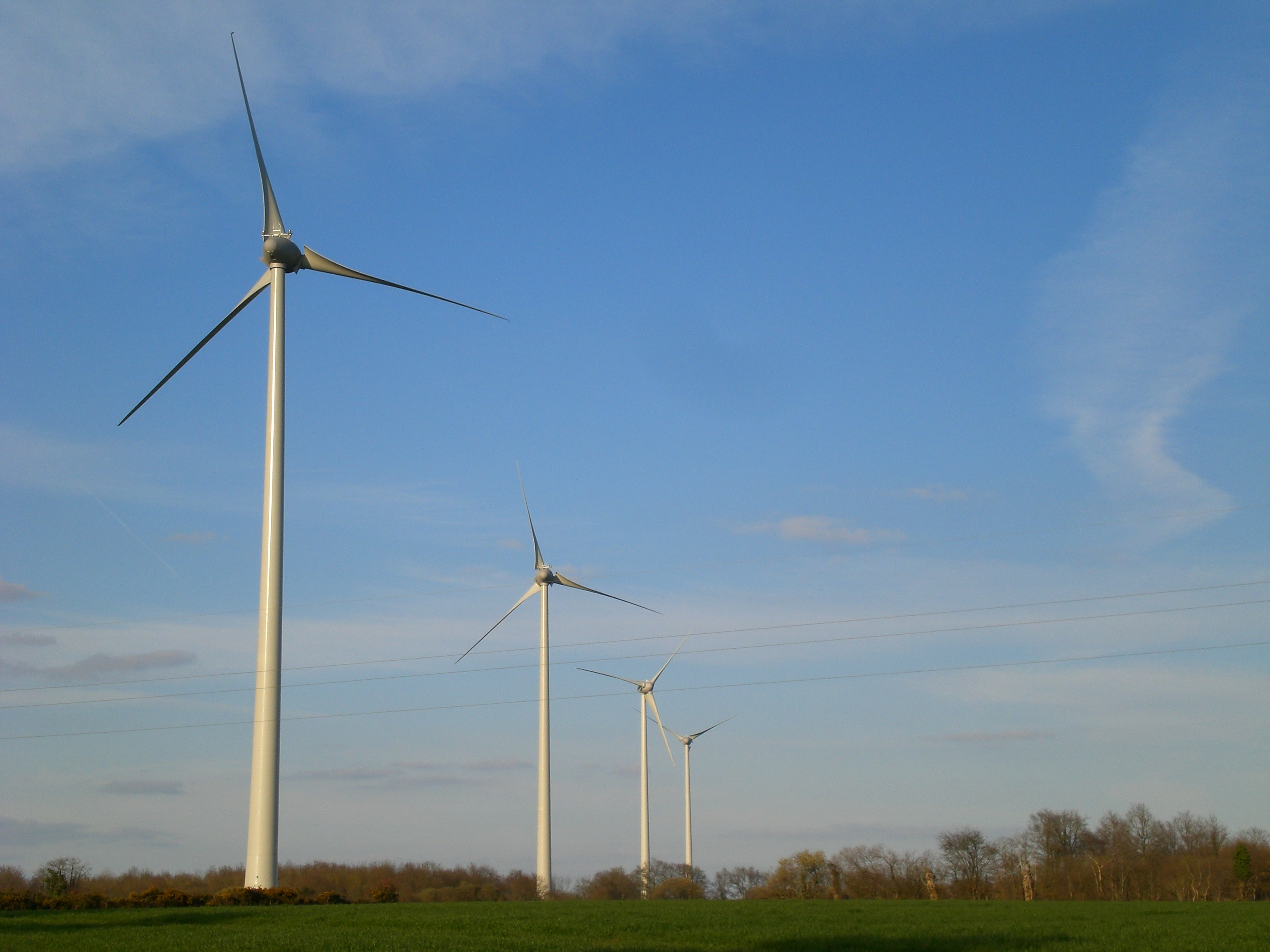 Parc éolien, 2007, Fr-44-Le Landreau/La Remaudière.